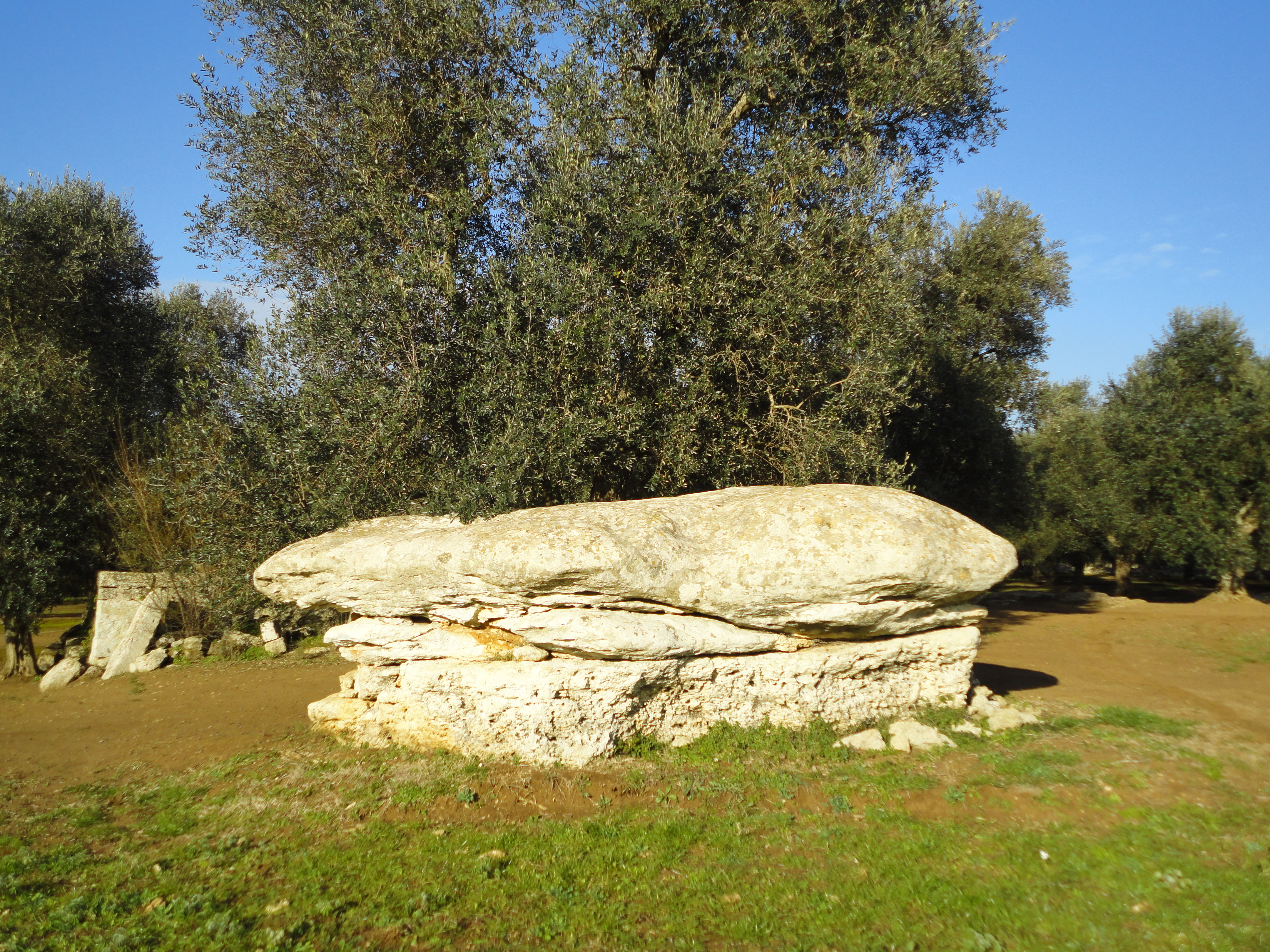 Letto della Vecchia Giuggianello, Lecce